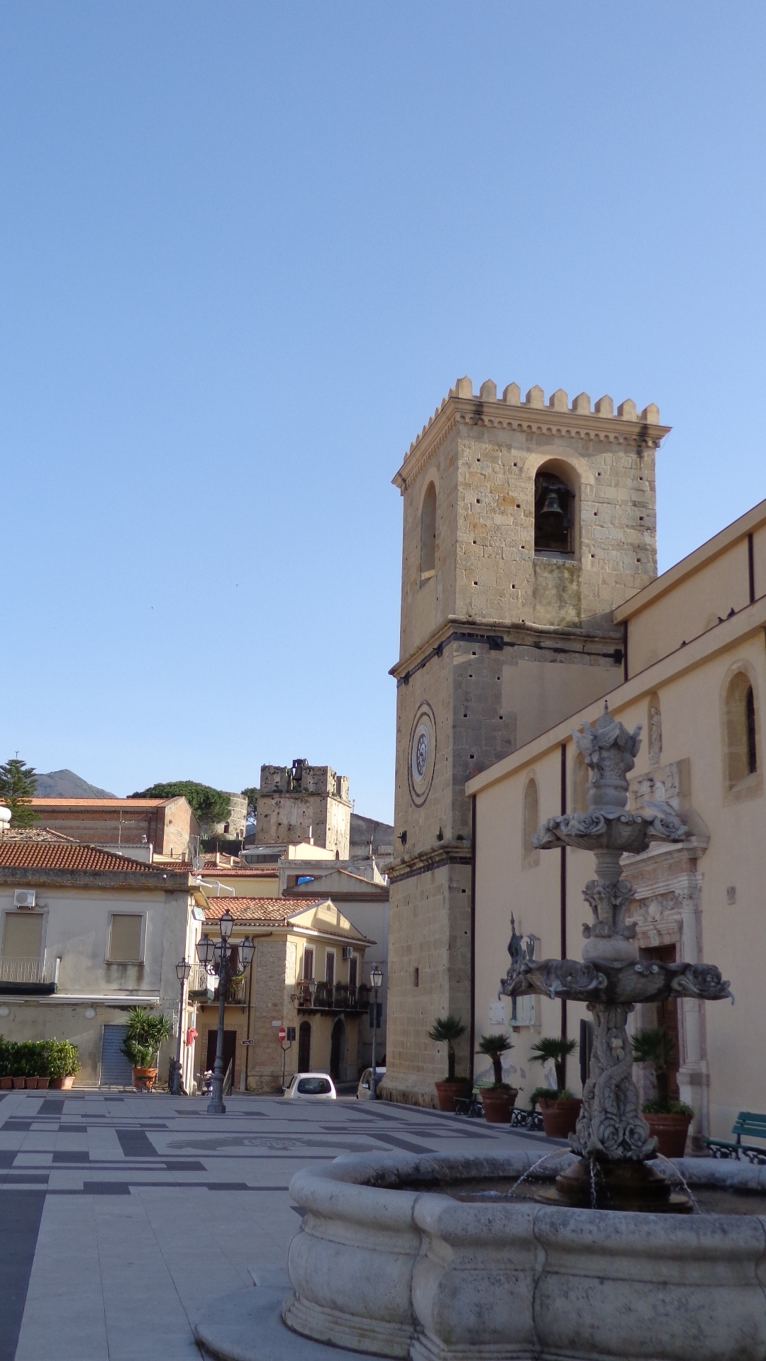 Le torri di Castroreale dal Belvedere